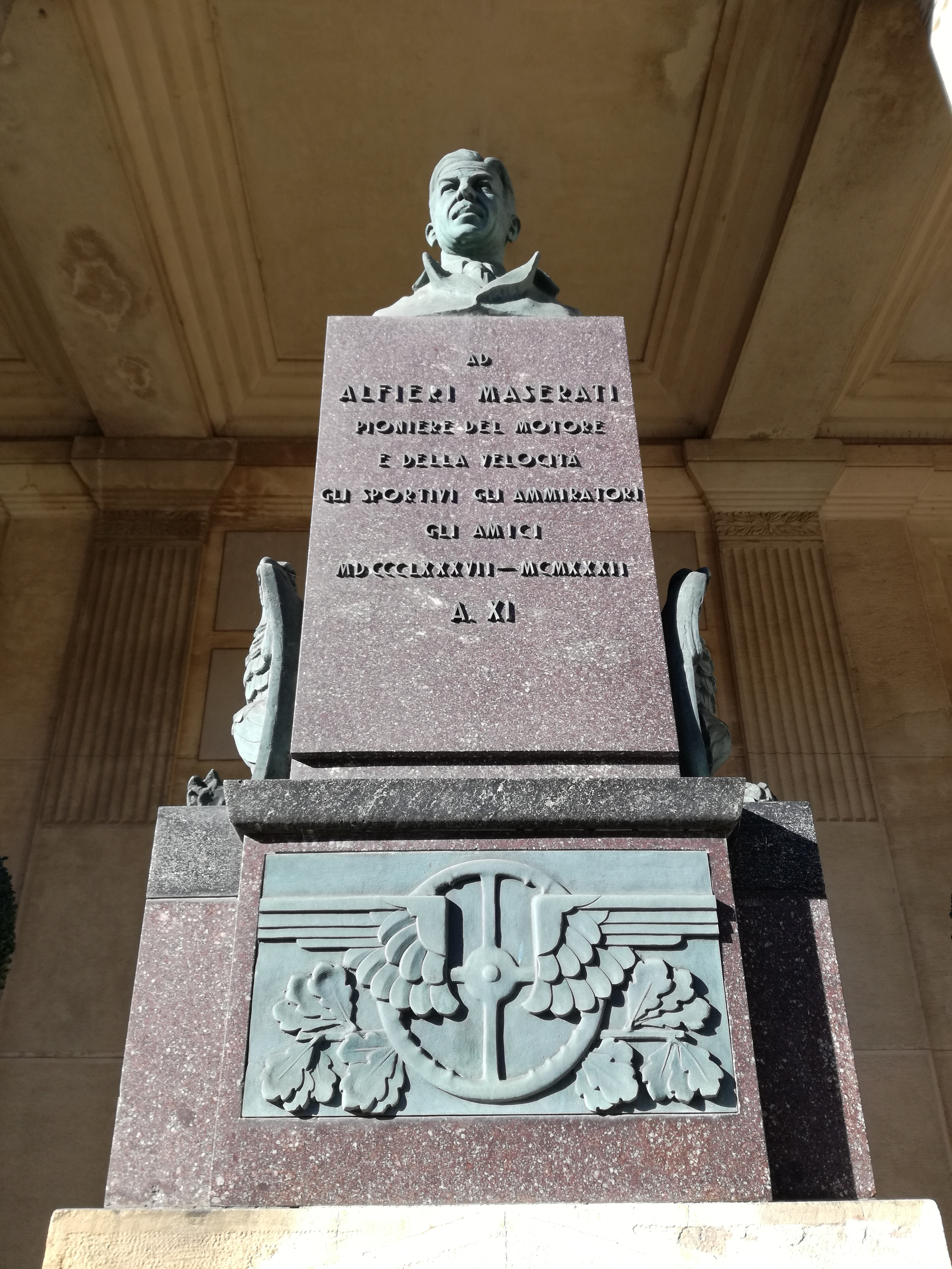 Grabstein des Automobilpioniers Alfieri Maserati auf dem Zentralfriedhof von Bologna